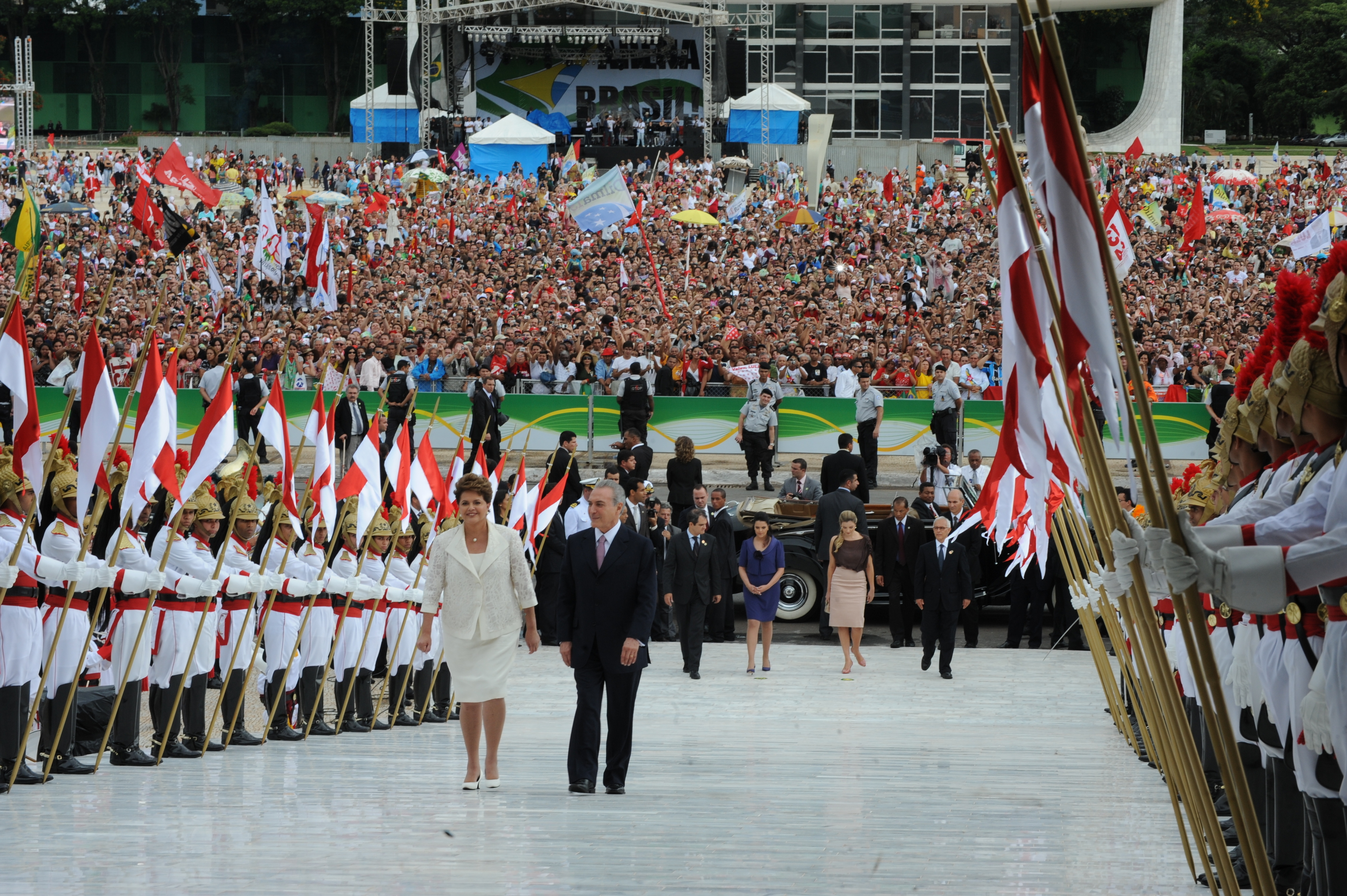 A presidenta Dilma Rousseff e o vice Michel Temer sobem a rampa do Palácio do Planalto. Brasília, 1º de janeiro de 2011.